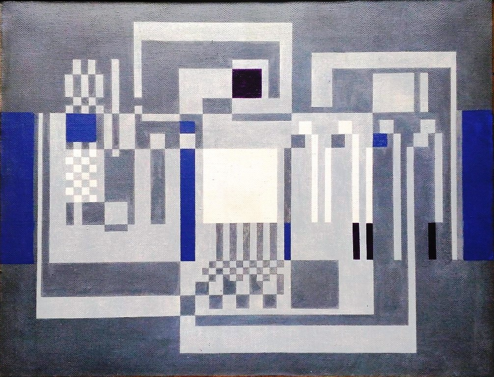 Opera pittorica del Maestro Romano Rizzato dal titolo "Composizione", tecnica acrilico su tela, dimensioni cm. 65x50, anno di realizzazione1967.